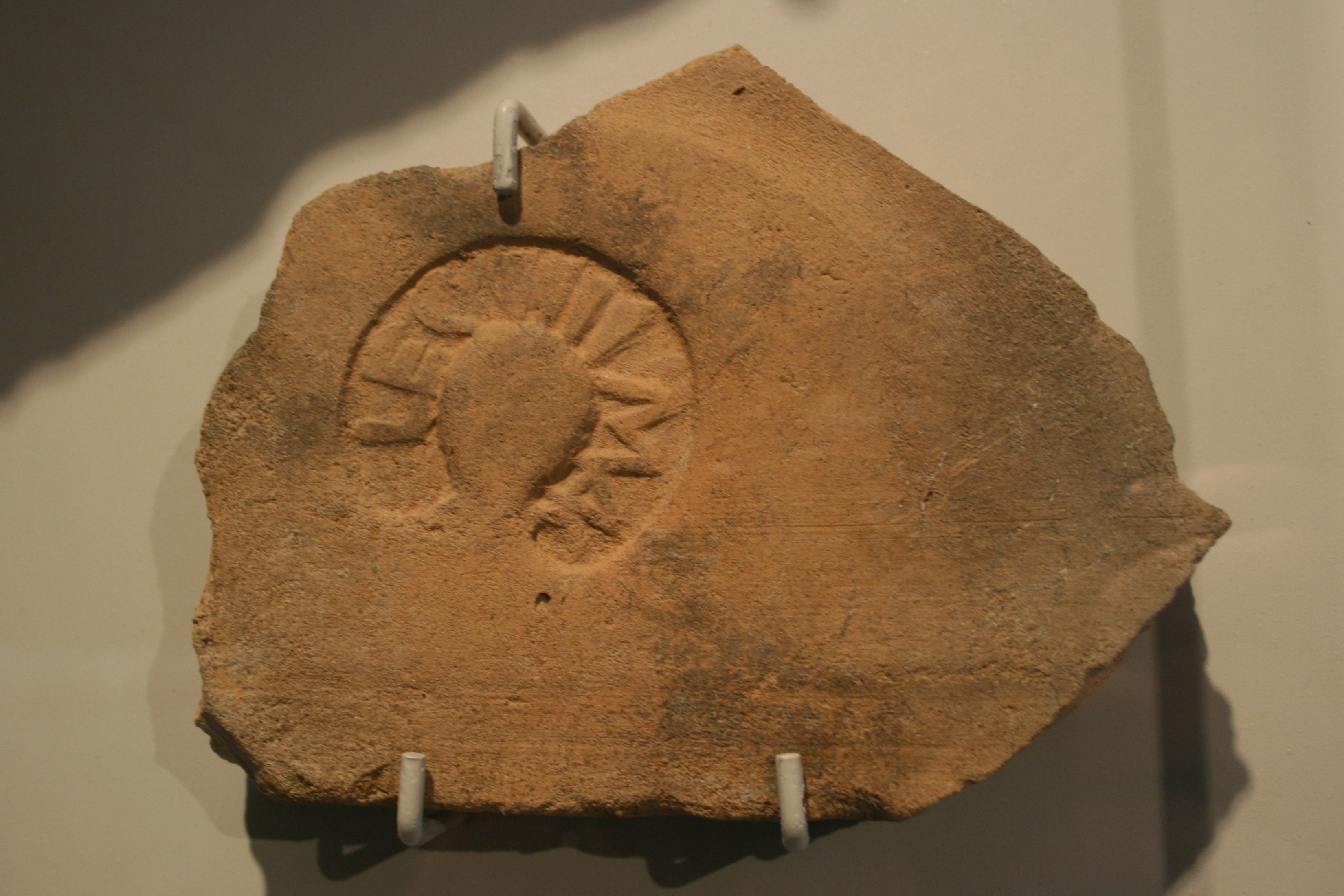 Ziegelstempel der Legio IIII Macedonica im Terra Sigillata-Museum Rheinzabern.